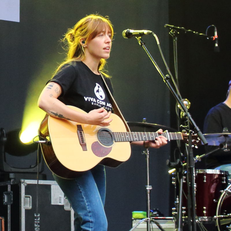 Antje Schomaker live auf der 1live Bühne bei Bochum Total 2019